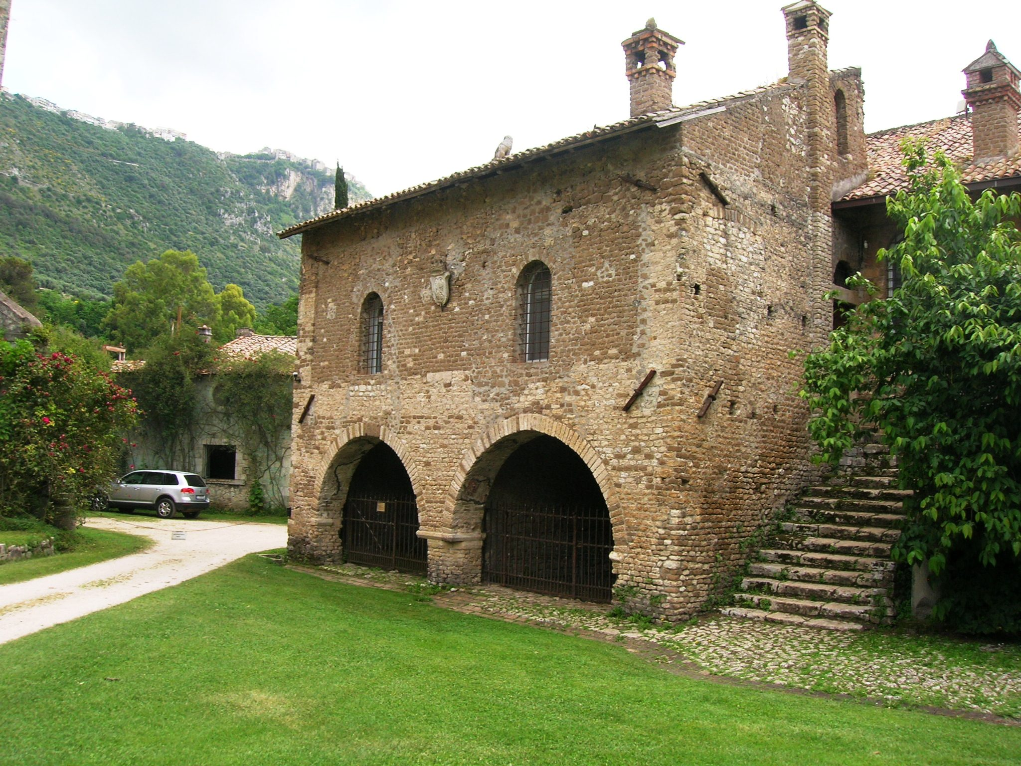 Municipio